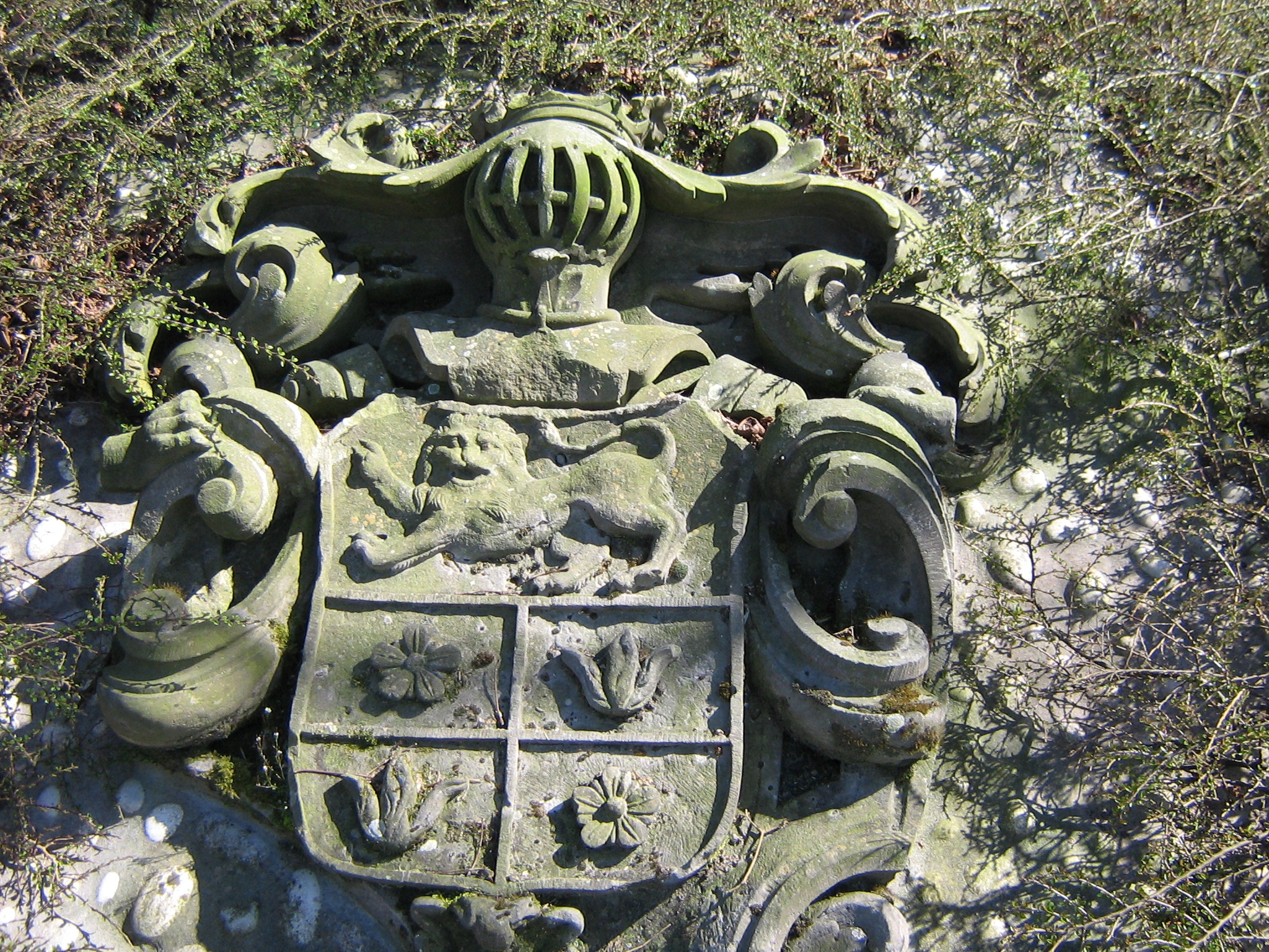 Klevers, Waepesteên van de ouwe ambachtseêren Van den Brand. Kleverskerke, Wapen van de familie Van den Brand (ambachtsheren van het dorp). Kleverskerke (Middleburg comm., Netherlands), coat of arms of patrician family Van den Brand who ruled the village.